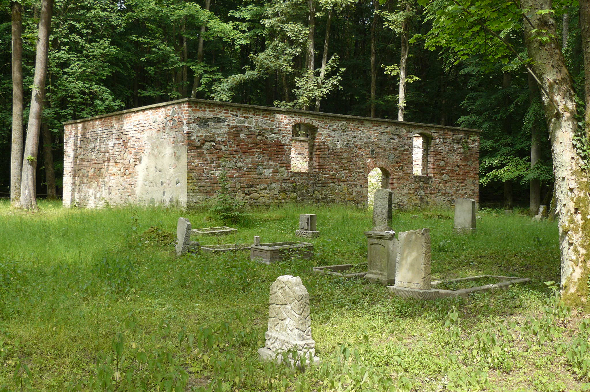 Osada Ostrowite w Drawieńskim PN.